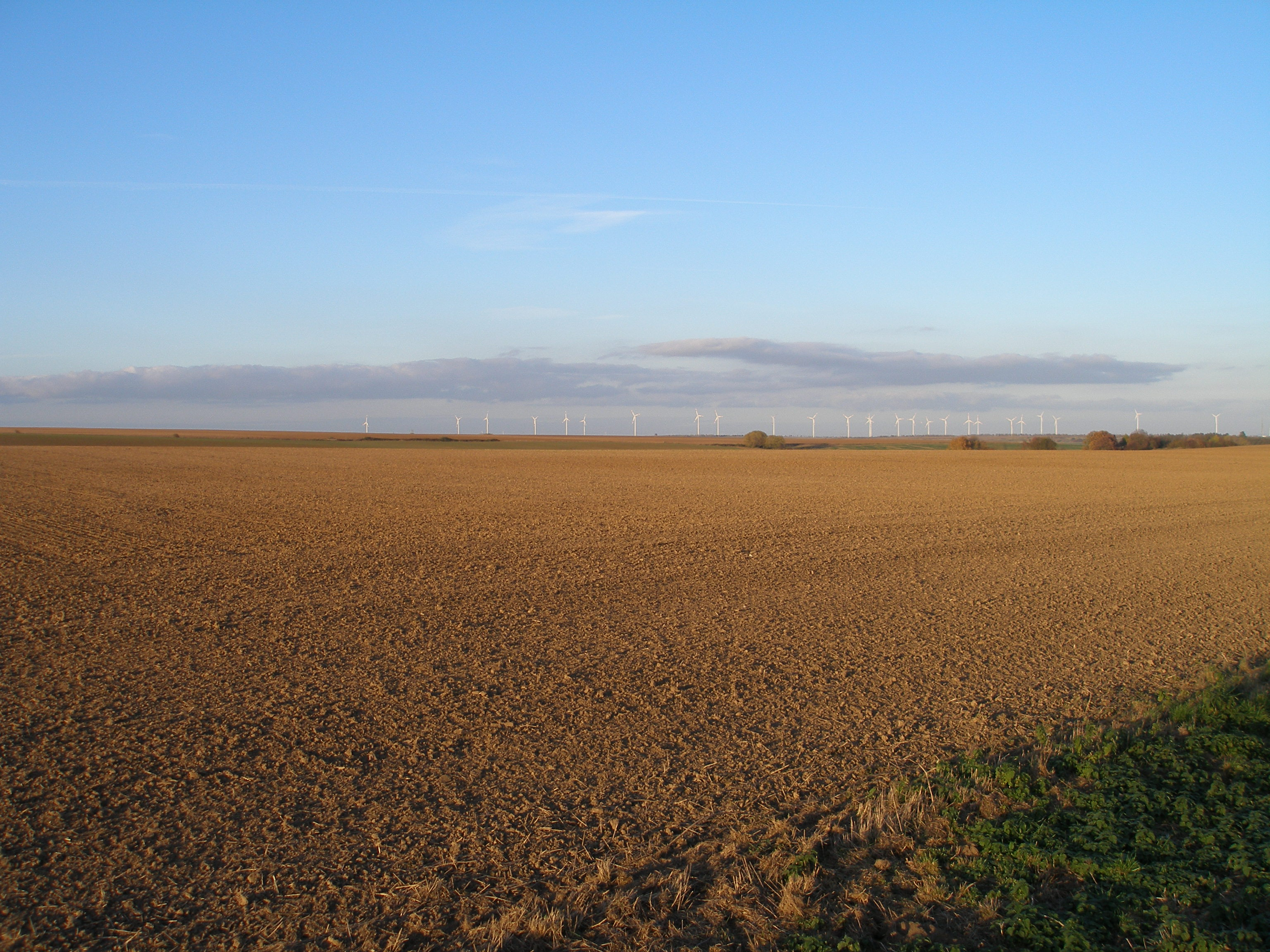 Blick von der Landesstraße 172 bei Hermannseck nach Nordosten über die Querfurter Platte zum Windpark bei Oberfarnstädt